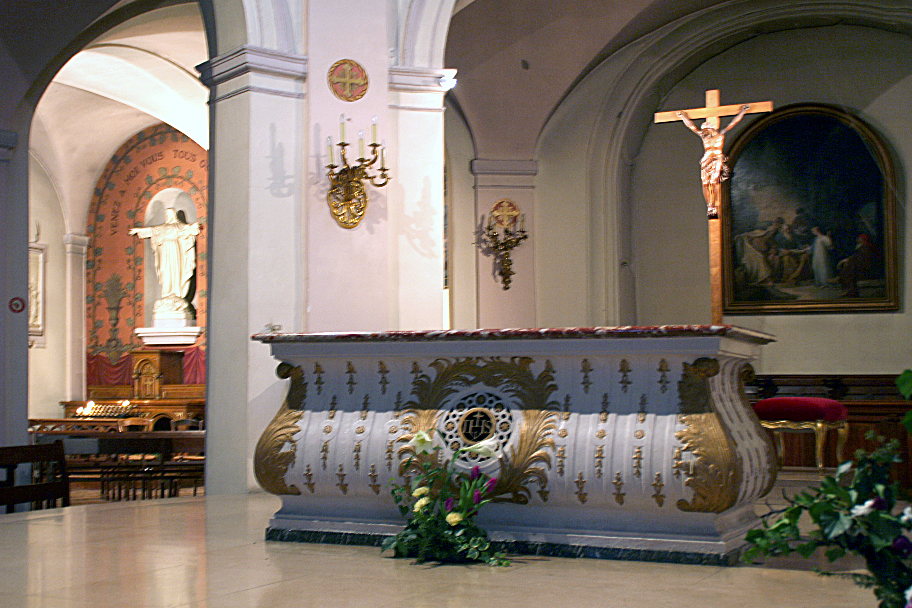 maître-autel de l'église Sainte-Geneviève d'Asnières-sur-Seine